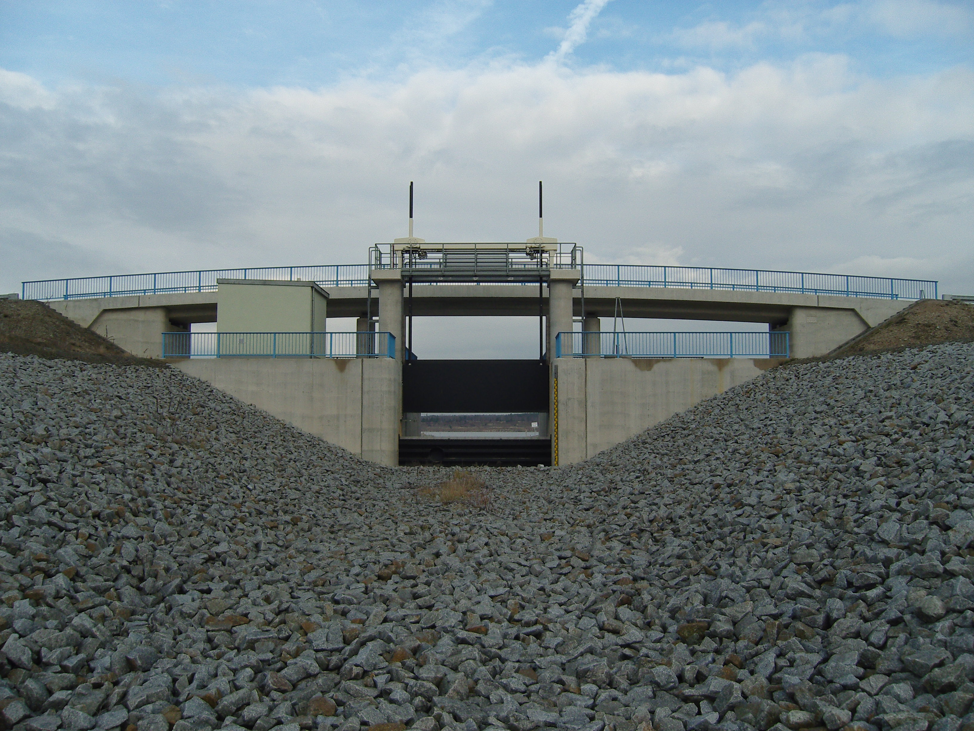 Der Rosendorfer Kanal ohne Wasser. Aufgenommen in Blickrichtung Sedlitzer See, der im Hintergrund zu sehen ist. Abgebildet ist auch das Wehr